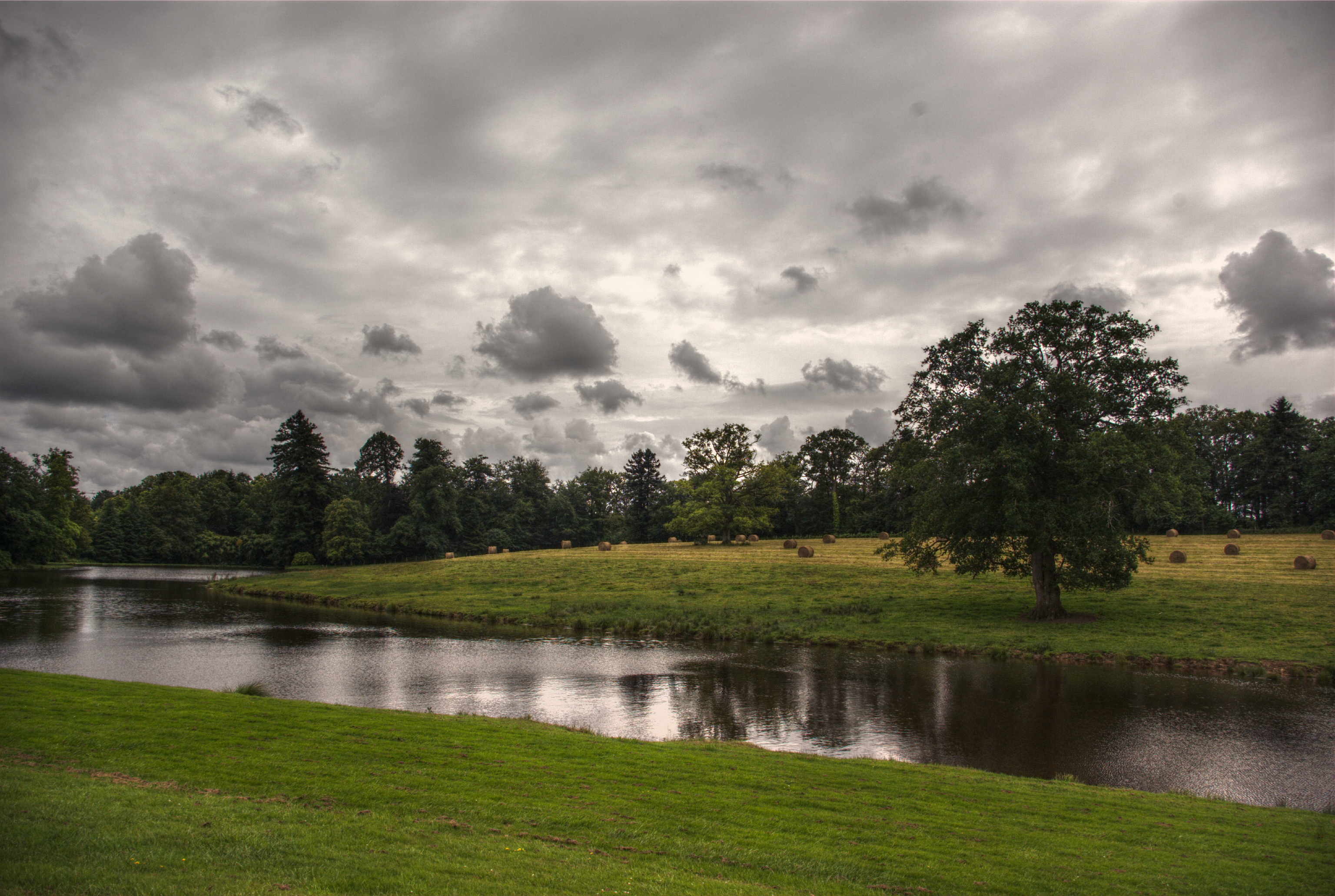 Vue de l'étang du parc du château de la Bretonnière, Vigneux-de-Bretagne, juin 2012